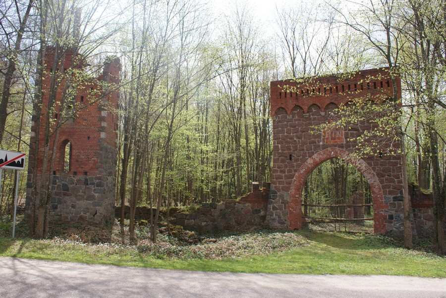 Krępa, pozostałości dawnego założenia pałacowego